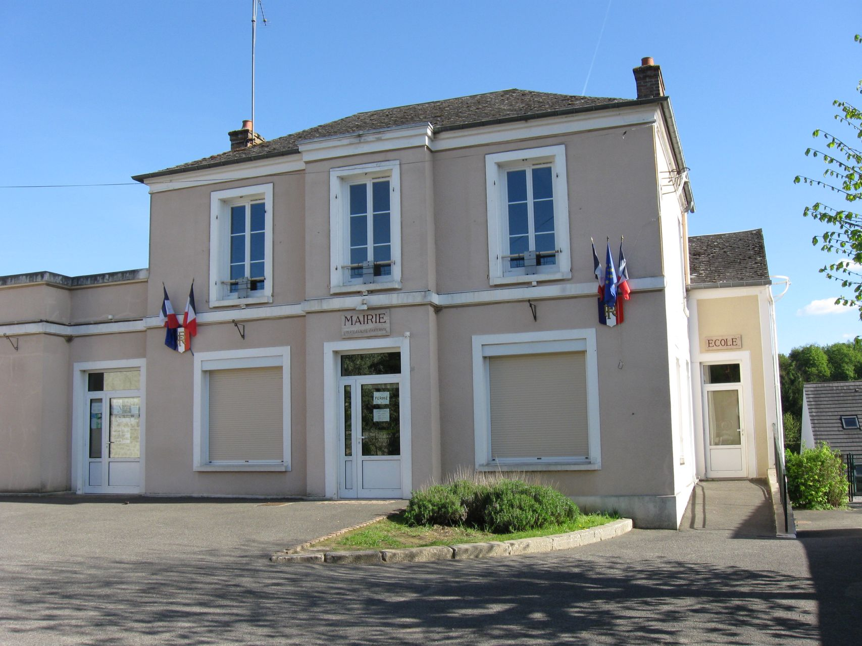 La mairie-école de Poligny (Seine-et-Marne, région Île-de-France)